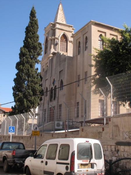 בית ספר אפיסקופלי בואדי ניסנאס